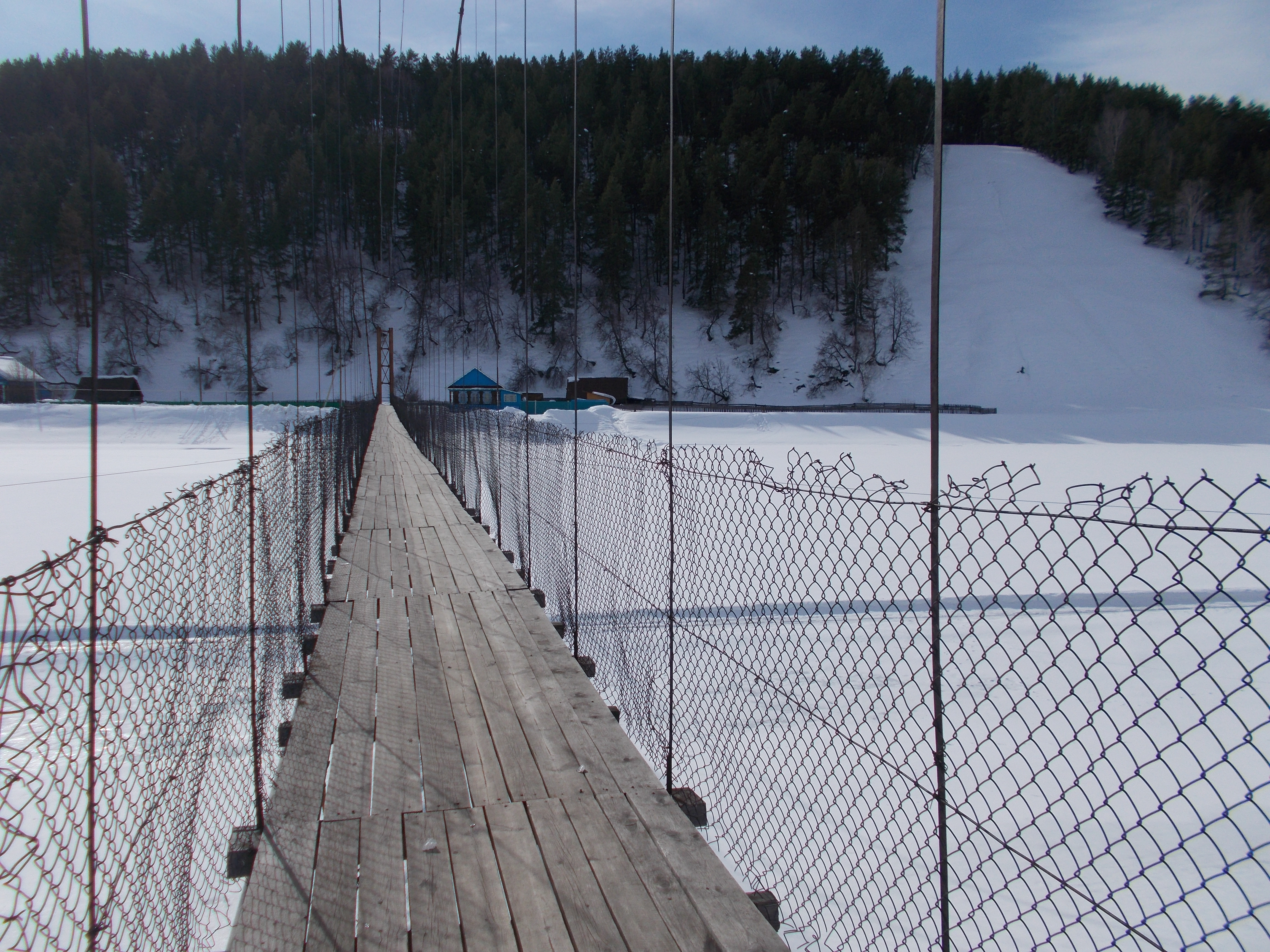 Висячий мост через р. Агидель в д.Байназар Бурзянского района